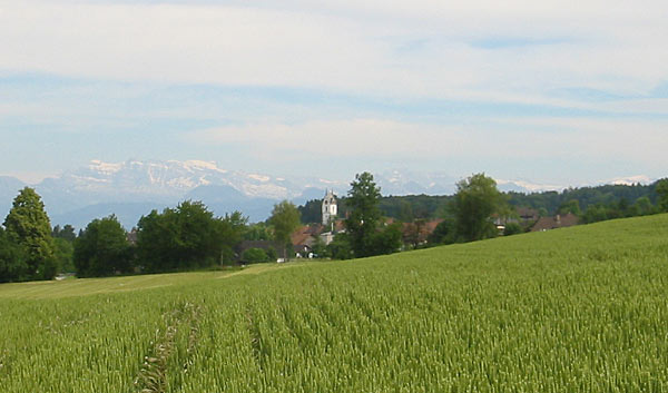 Blick von Nordwesten auf Maur mit seiner Kirche. Im Hintergrund sind die Glarner Alpen mit dem Glärnisch zu erkennen.